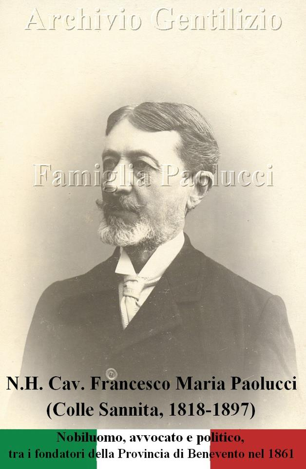 Francesco Maria Paolucci (1818-1897), nobile, avvocato e politico italiano.